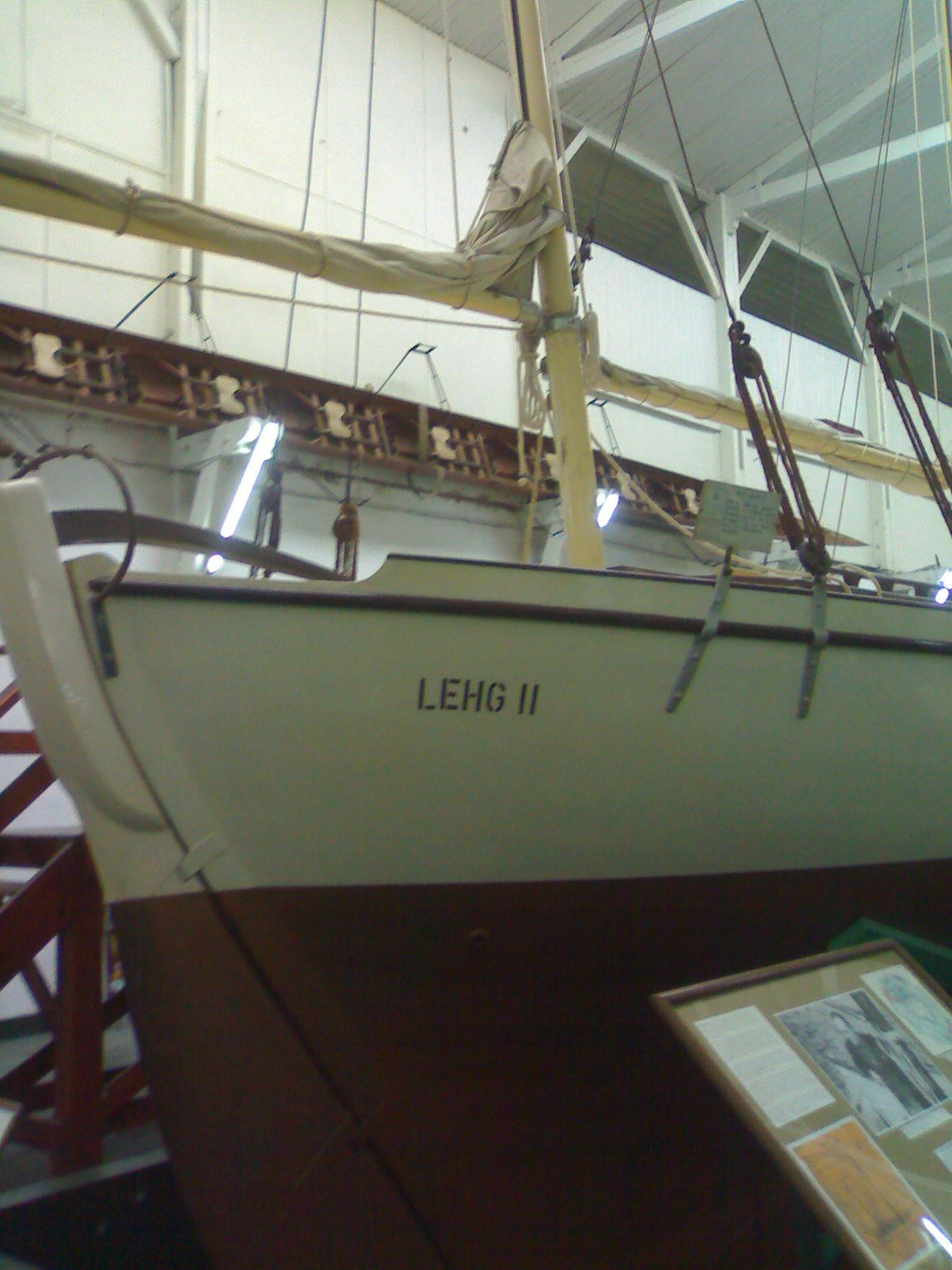 Lehg II embarcación con la que el navegante argentino Vito Dumas dio la vuelta al mundo en solitario (Museo Naval de Tigre)